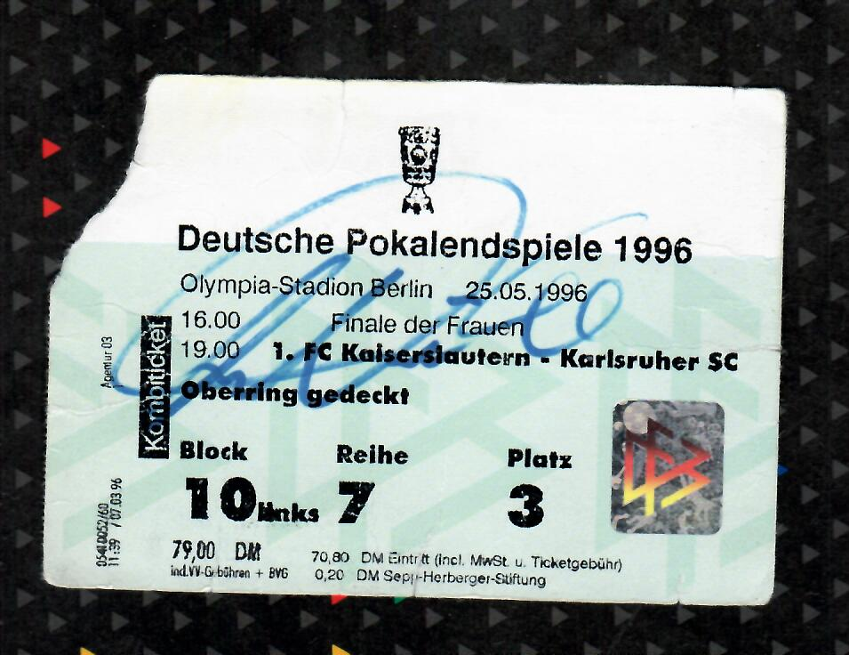 Original Eintrittskarte des DFB-Pokalendspiels mit Autogramm des teilnehmenden Spielers Sean Dundee